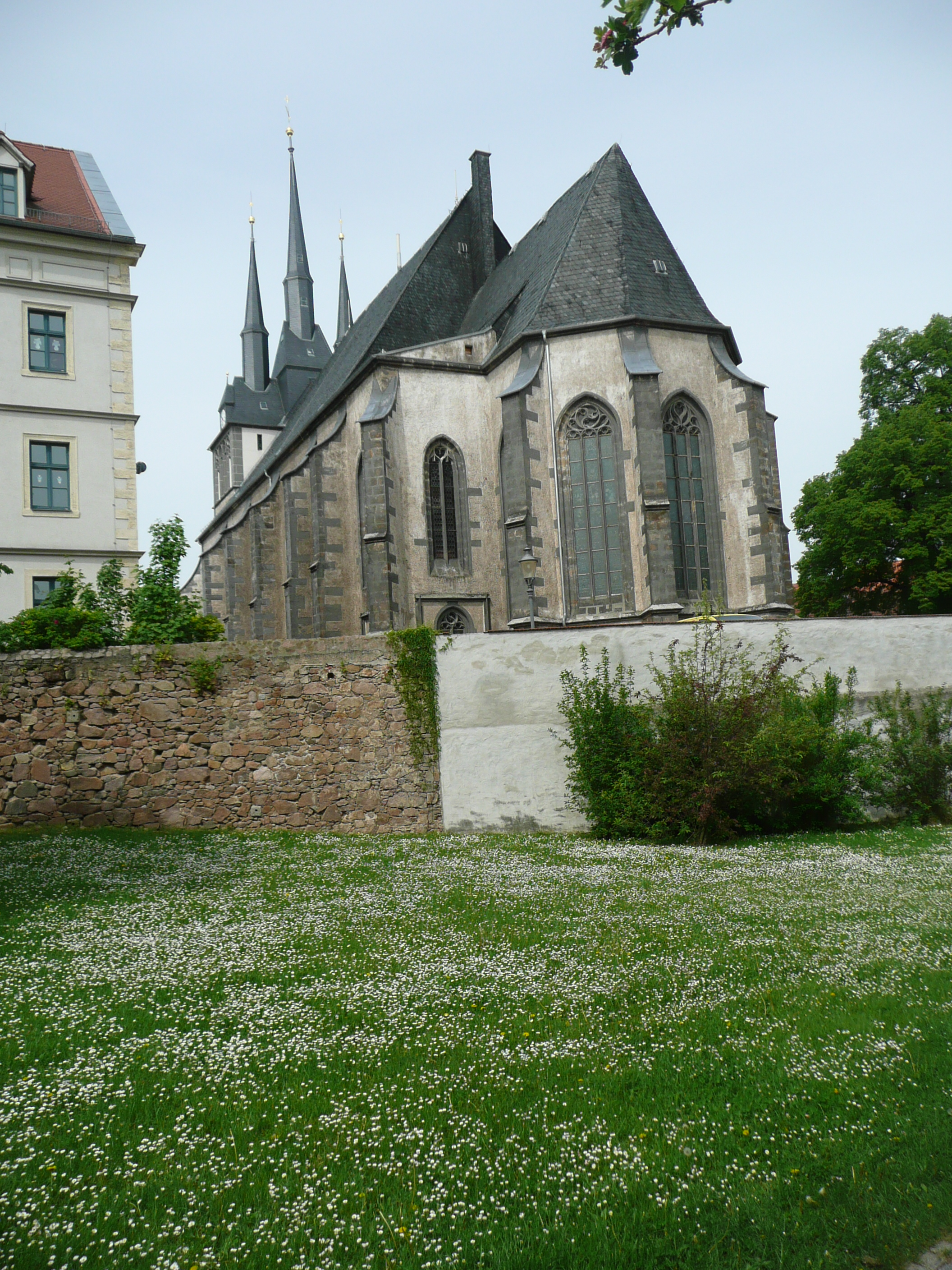 Ansicht der Kirche in Lommatzsch von hinten